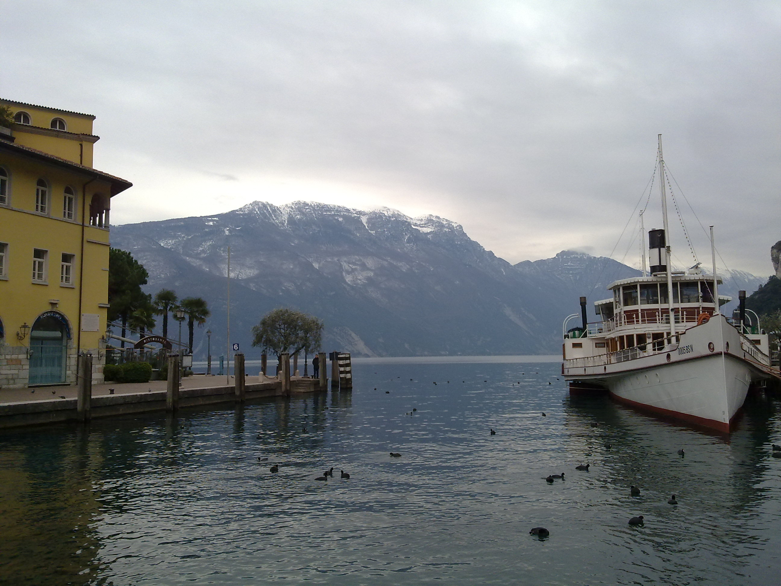 Riva del Garda - Il lago di Garda